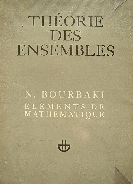 Couverture du livre : Théorie des ensembles, Éds N Bourbaki éditions Herman, première édition